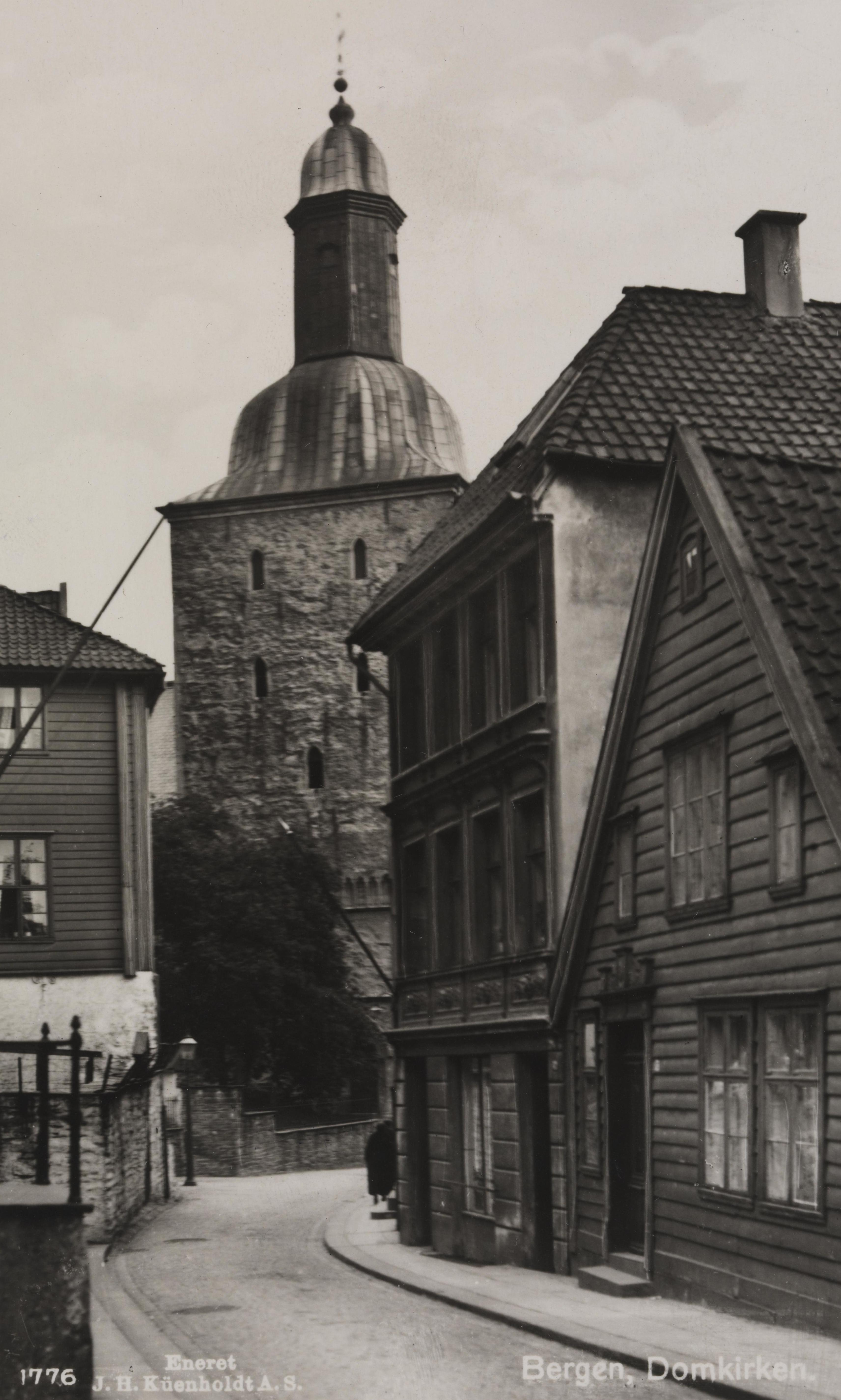 Bildet er hentet fra Nasjonalbibliotekets bildesamling Bergen, Hordaland